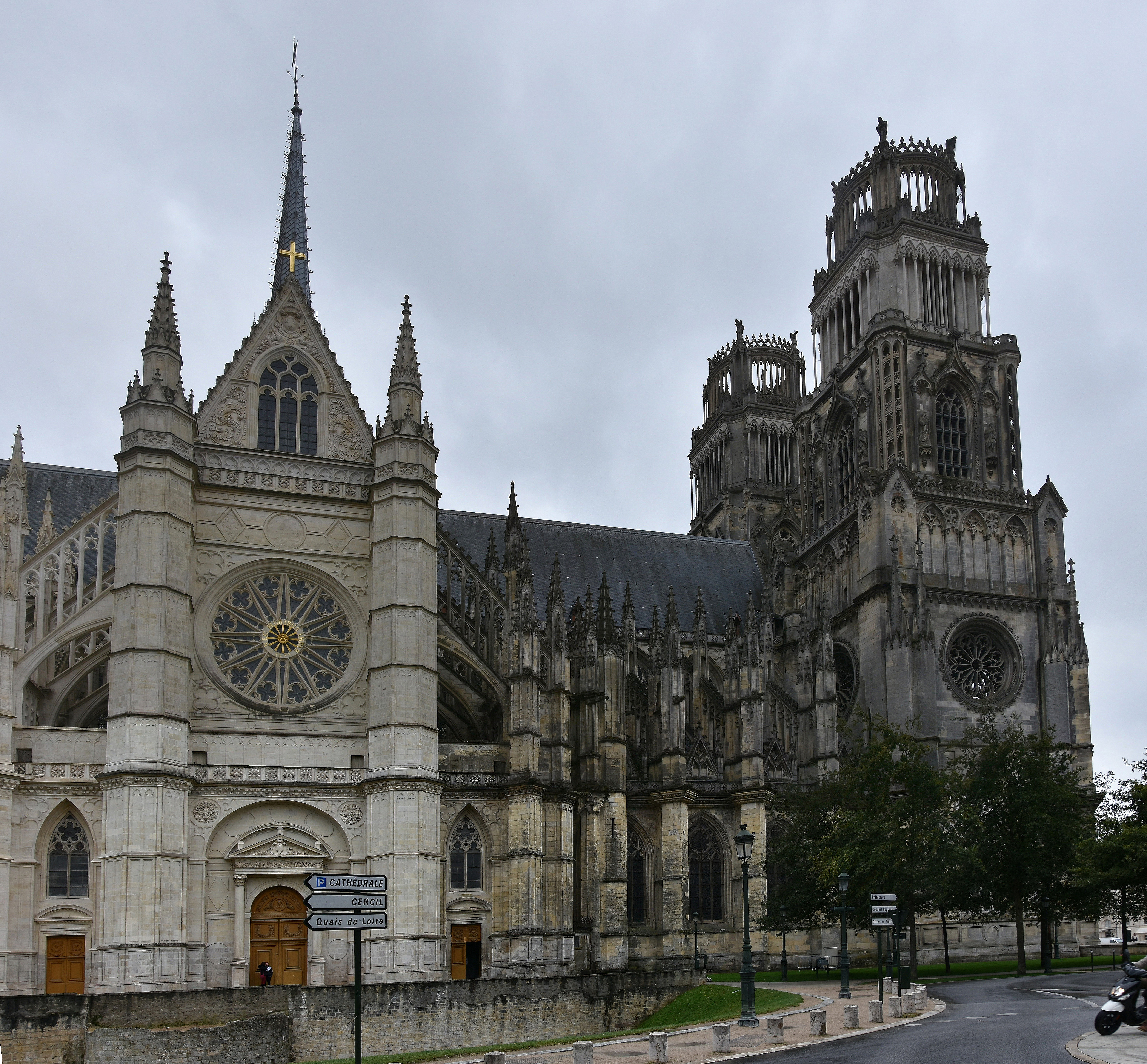 Kathedraal van Orléans 29-09-2019 13-13-36